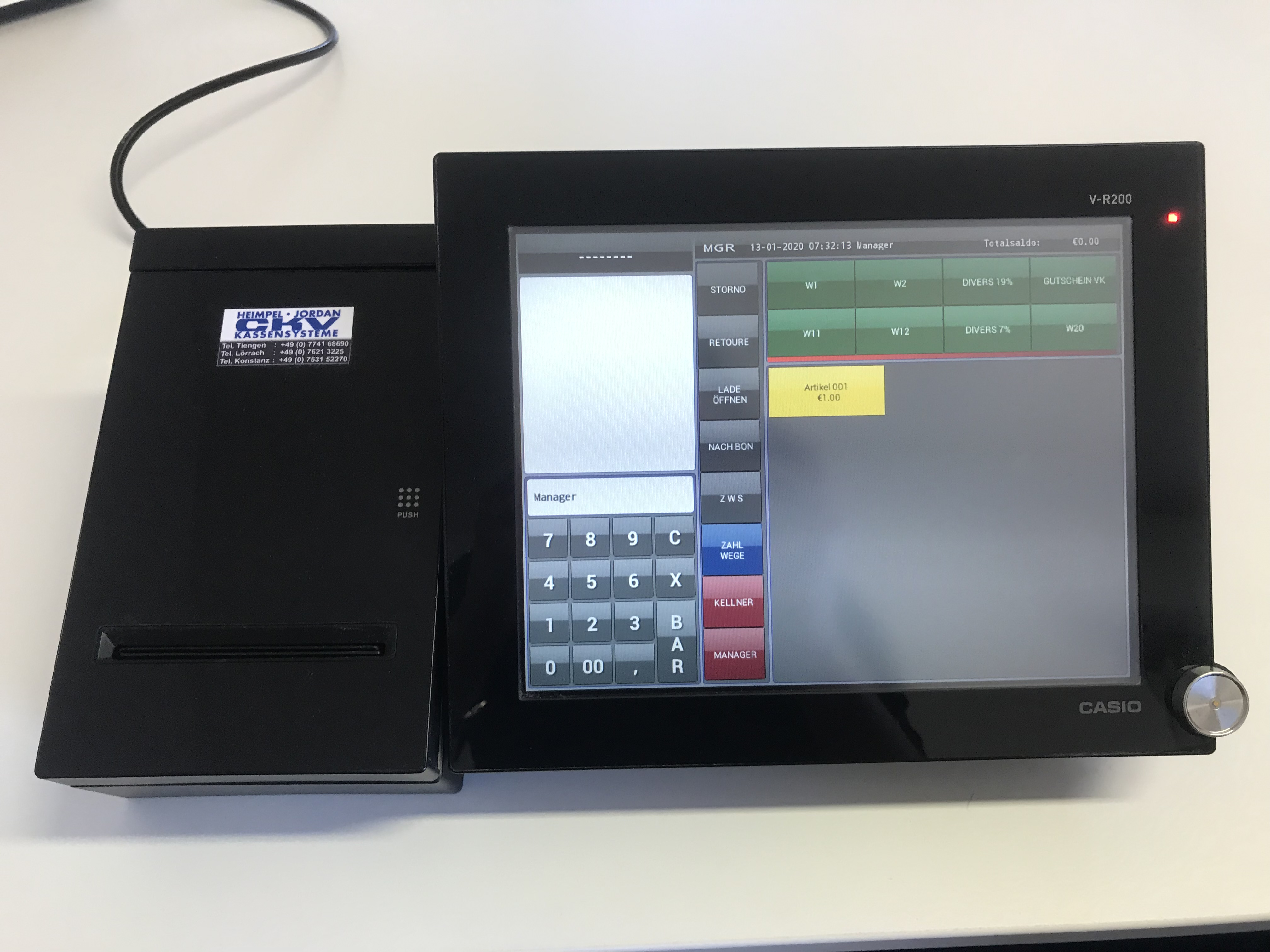 Kassensystem GoBD TSE konform